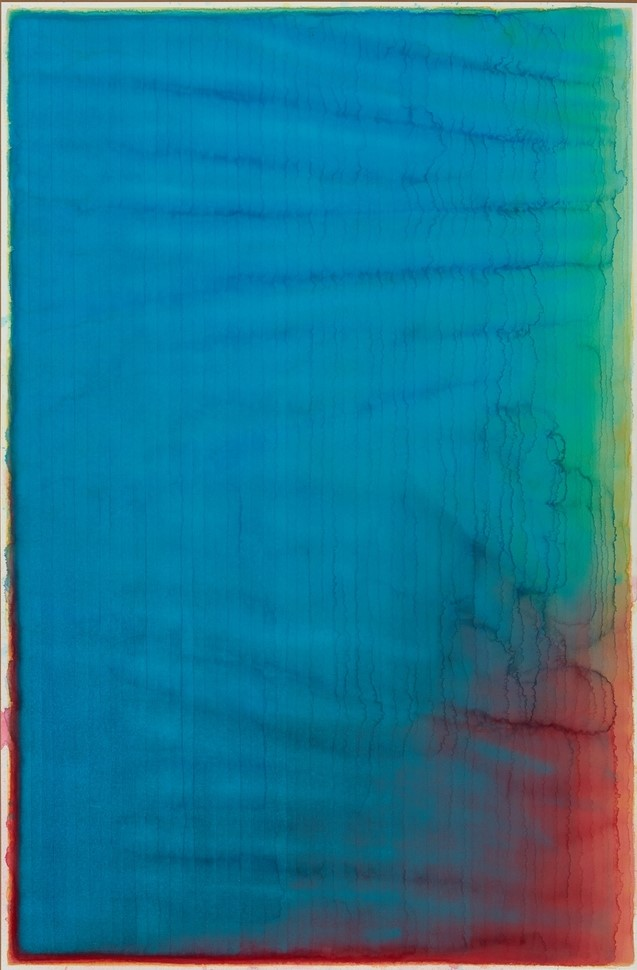 Aus der Serie Just Waterlolors, (022) 2017, 168 x 110 cm, Aquarell auf Papier Dauerleihgabe: Pinakothek der Moderne Staatliche Graphische Sammlung München